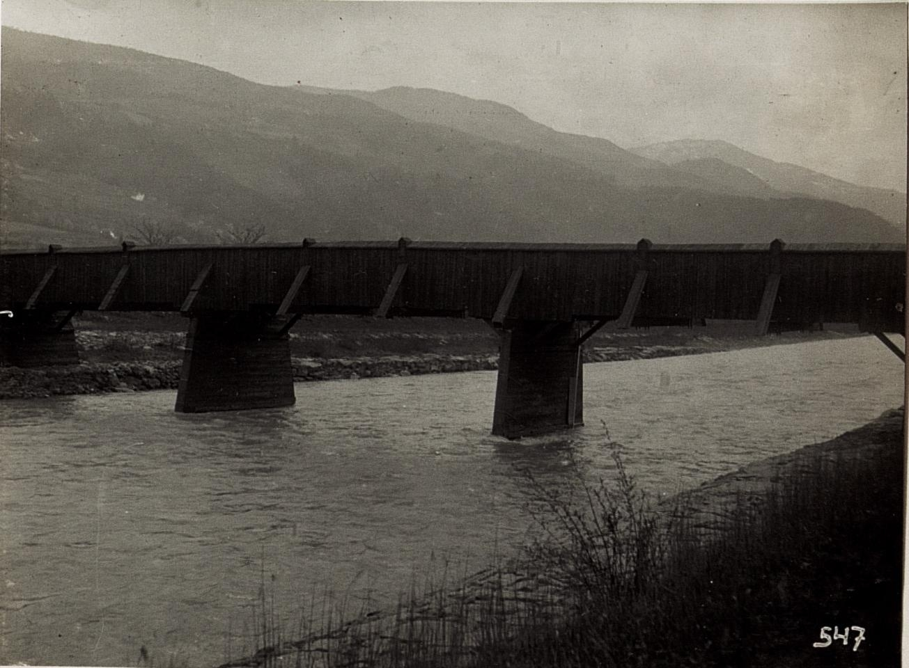 Die, nach dem Kommandanten des siegreichen 14. Korps General der Infanterie Roth, benannte Brücke über die Eisack bei Brixen.